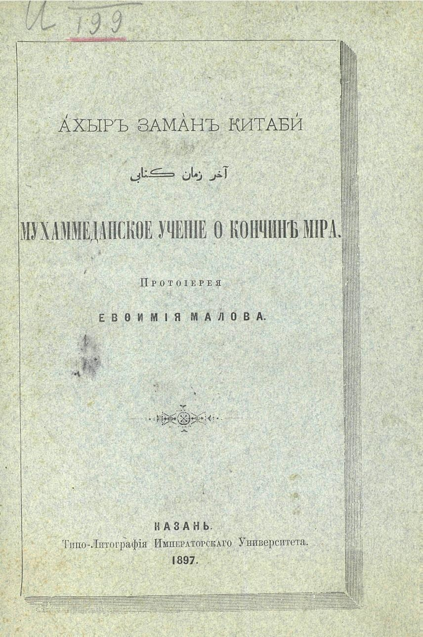 Обложка книги "Ахыр заман китаби = Мухаммеданское учение о кончине мира".